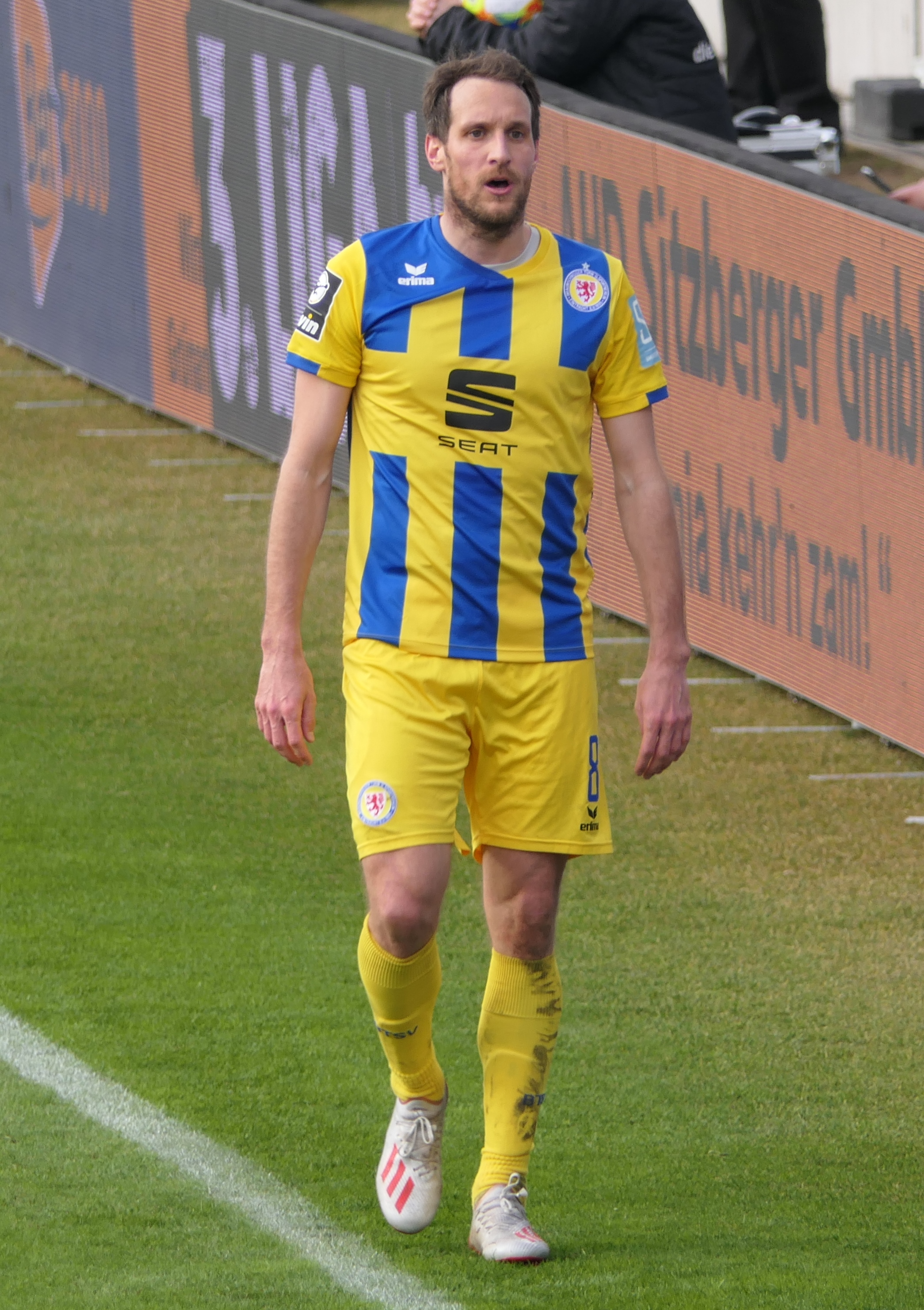 Der Fussballprofi Stephan Fürstner im Trikot von Eintracht Braunschweig beim Auswärtsspiel gegen den TSV 1860 München am 26.01.2020.